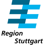 RegionStuttgartLogoVersion3farbig